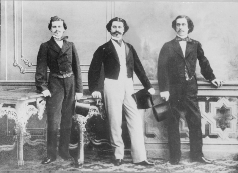 I tre fratelli Strauß: Eduard, Johann e Josef, fotomontaggio contemporaneo